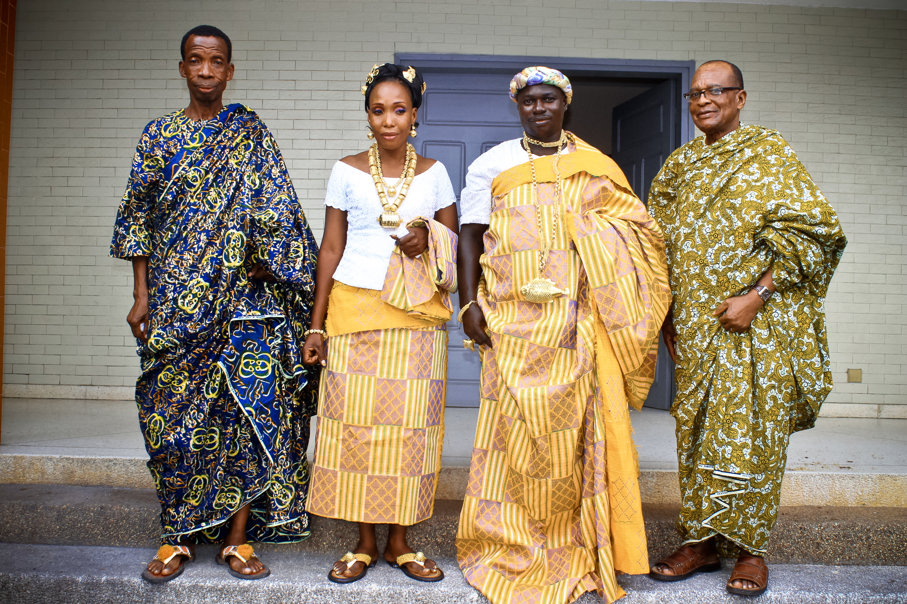 Photo de famille au cours d´une ceremonie de dote, les belles famille pour marquer l´union sceller entre les deux familles posent avec les nouveaux a travers les deux chefs de famille.